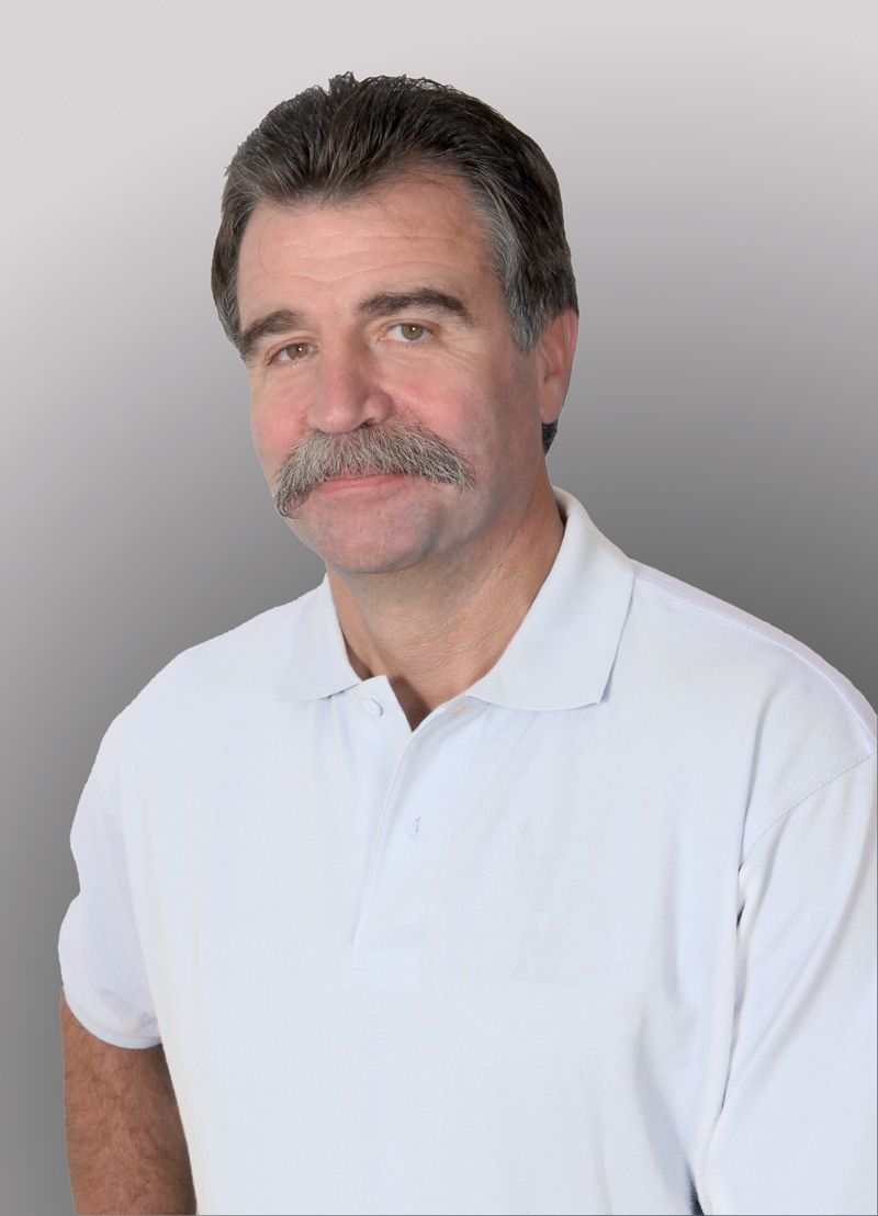 Schirmherr Heiner Brand copyright MaxplayDHM Sportsmarketing